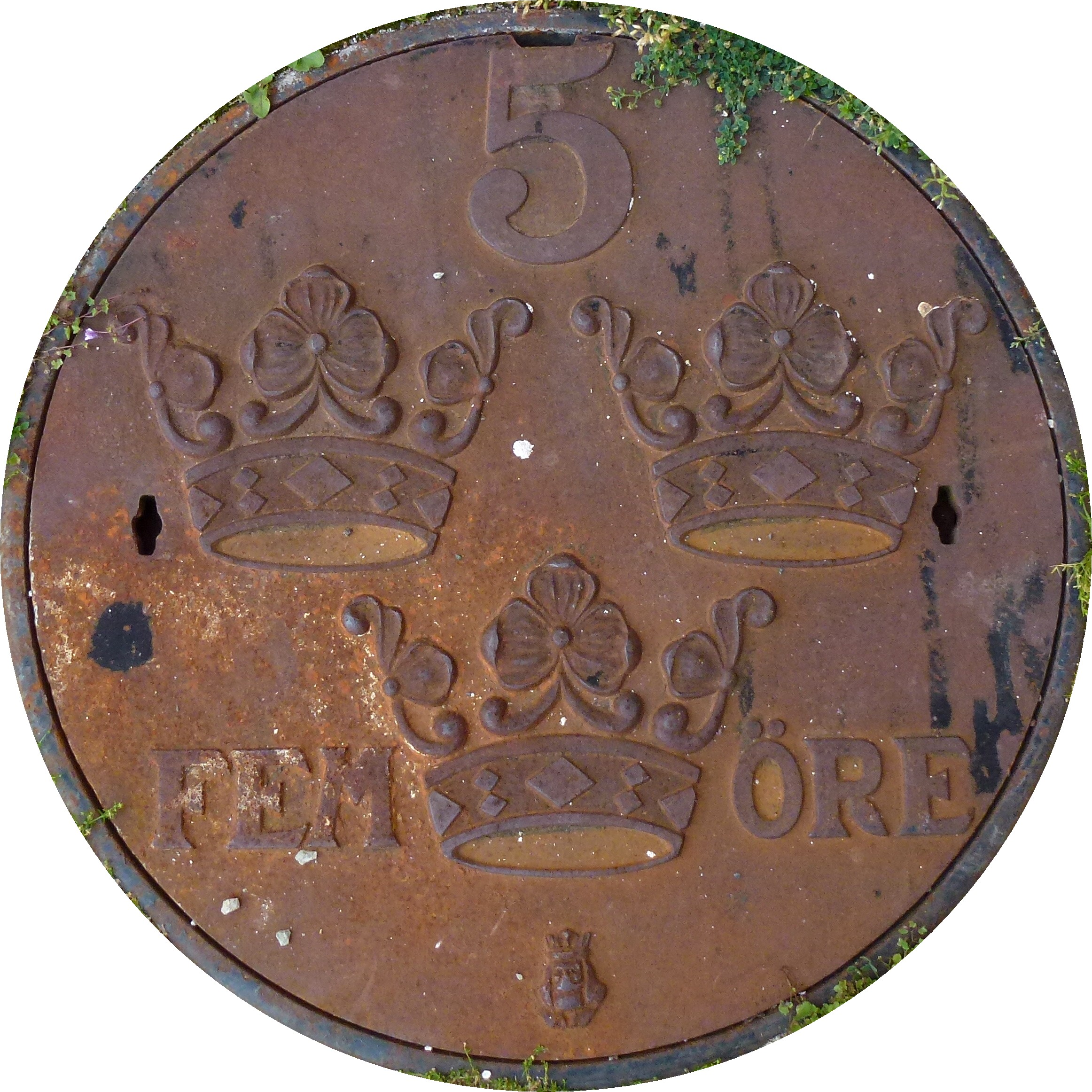 Tullgarns slott brunnslock i gjutjärn i form av en femöring